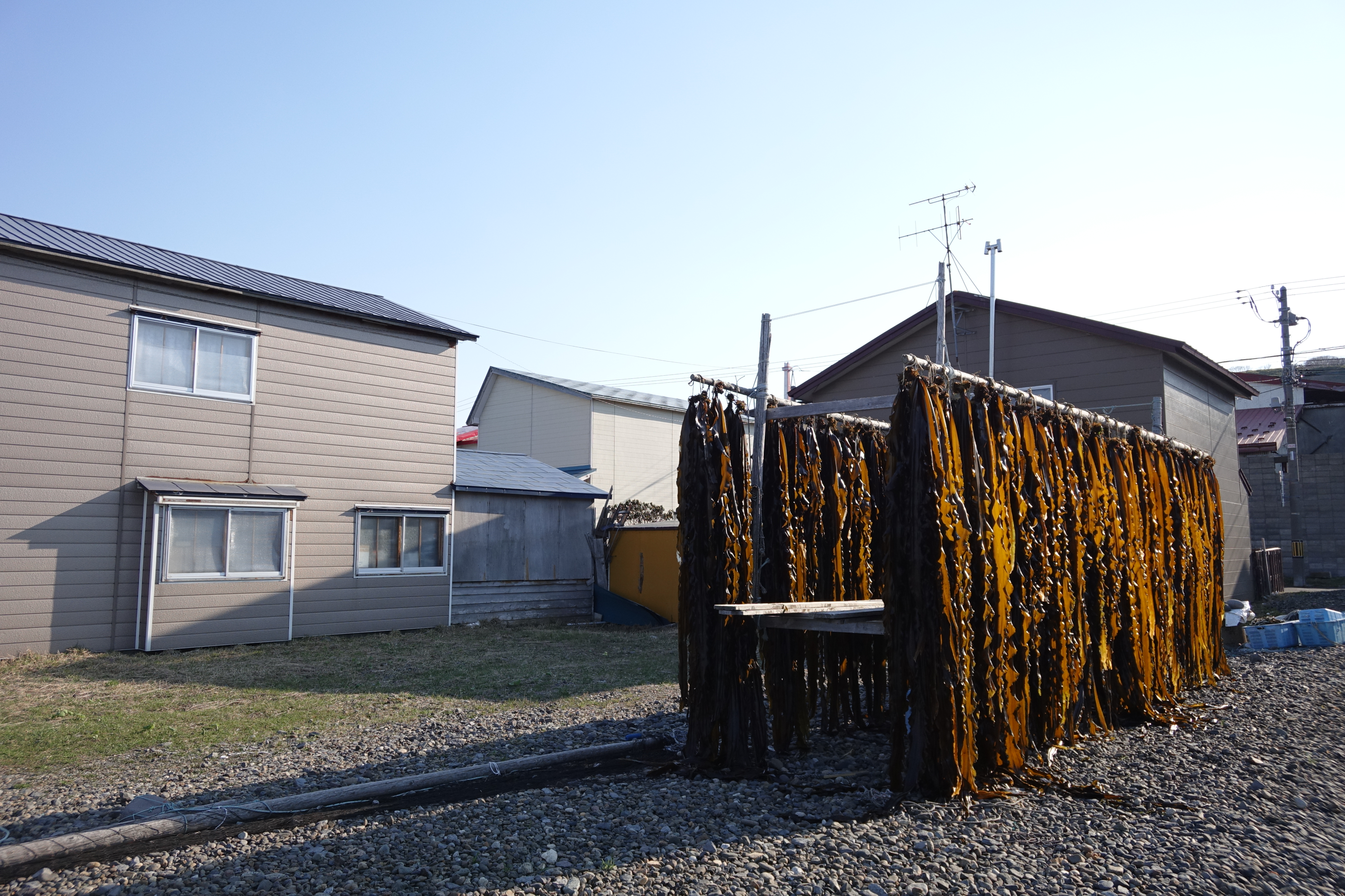 さすがは稚内